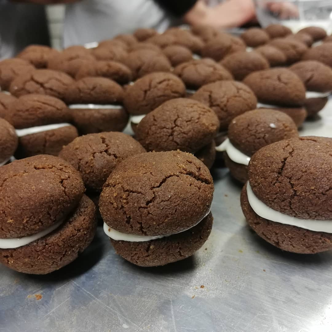 Baci di dama al cacao con crema al cioccolato bianco